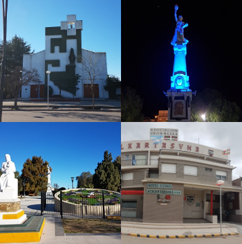 Collage de Macachín